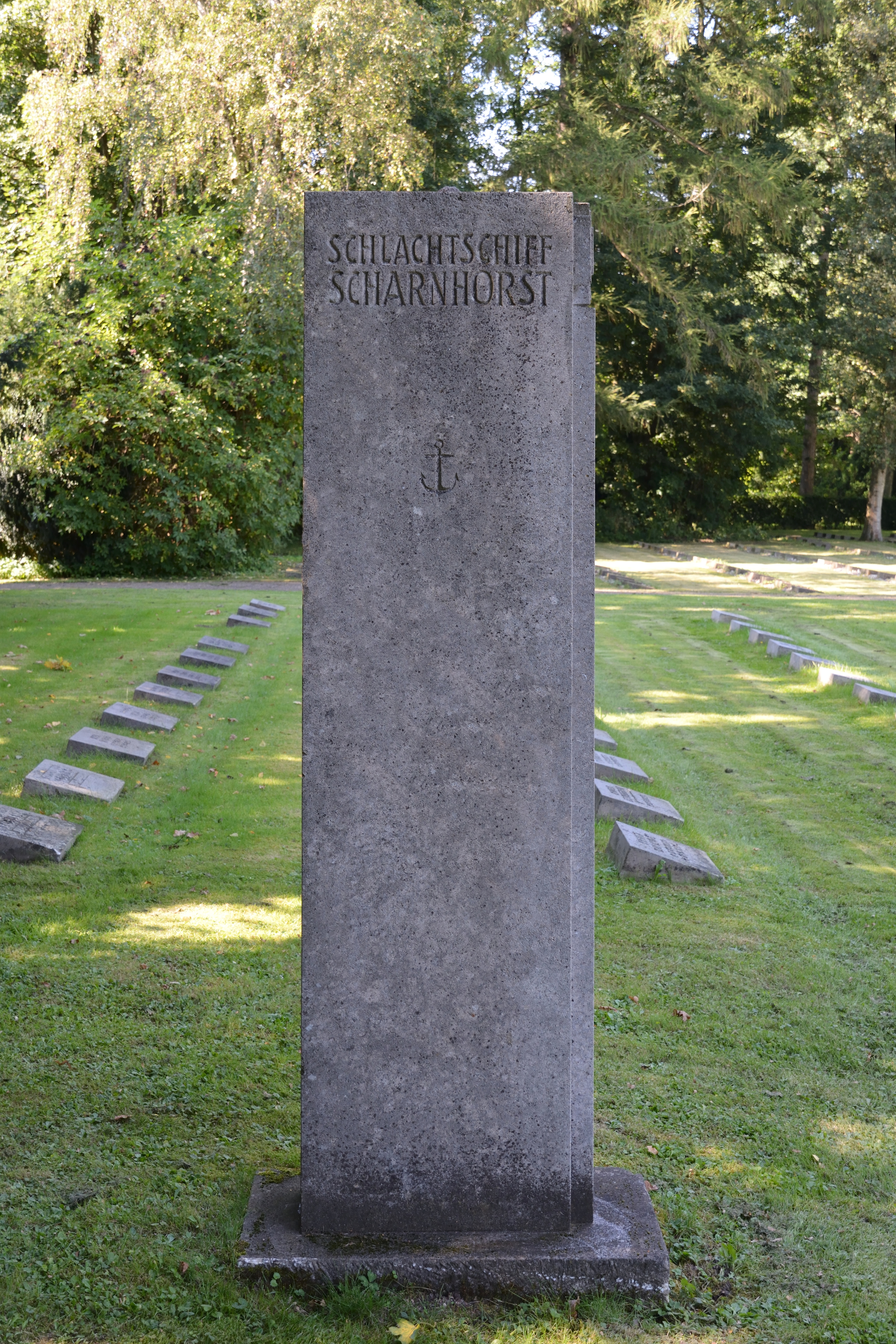 Impressionen aus dem Nordfriedhof in Kiel Ein Grossteil diese Friehofes ist den Gefallenen der beiden Weltkrige gewidmet.